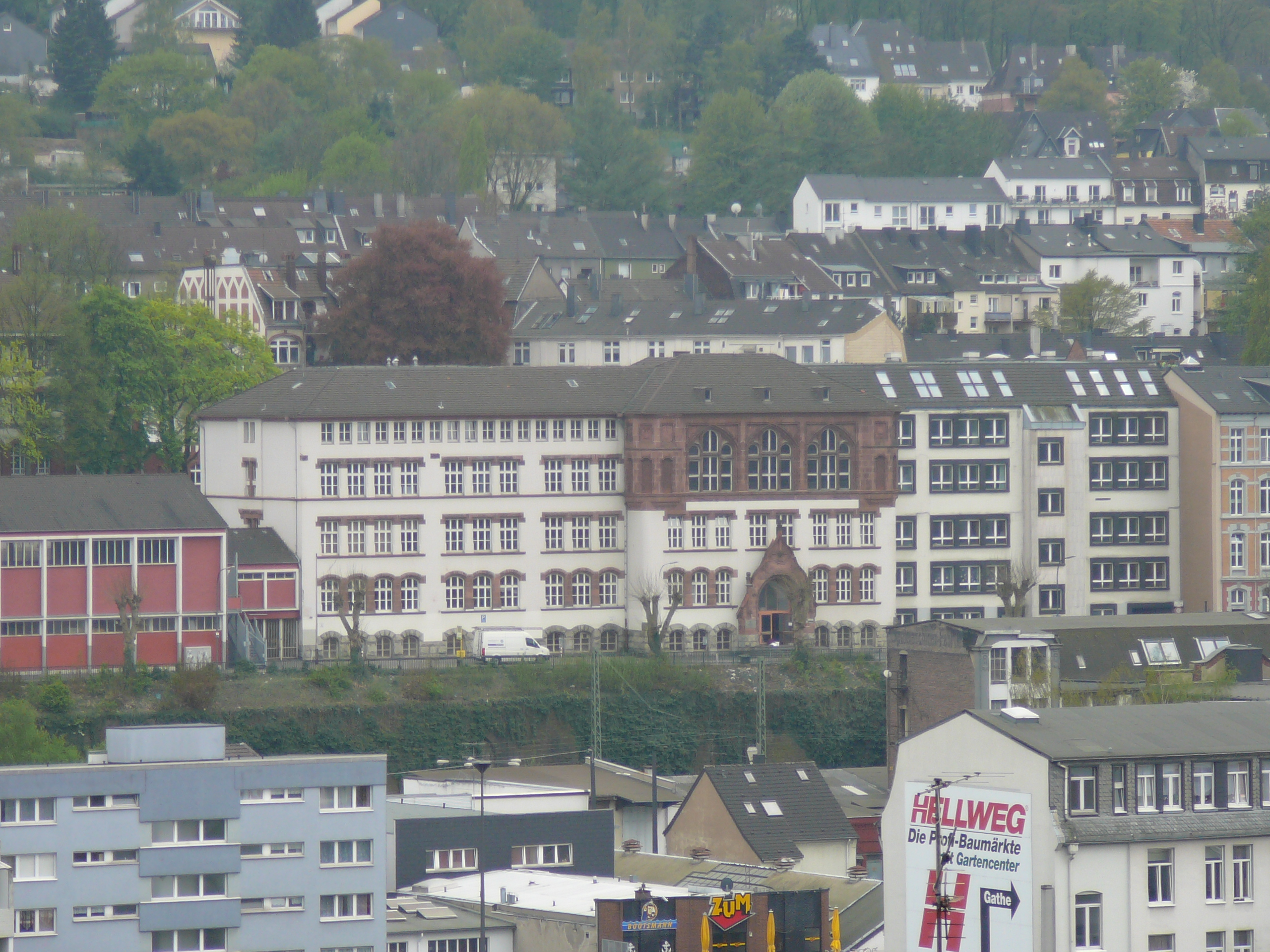 Tannenstraße, Wuppertal